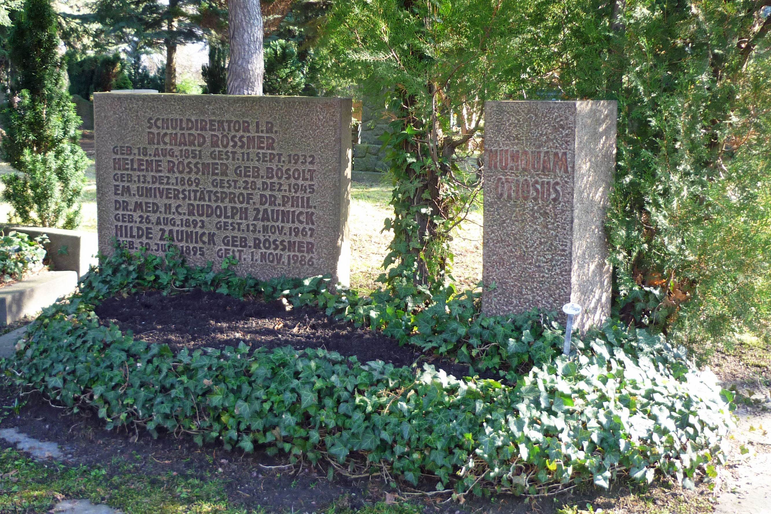 Grab des Arztes Rudolph Zaunick (1893–1967) auf dem Trinitatisfriedhof in Dresden